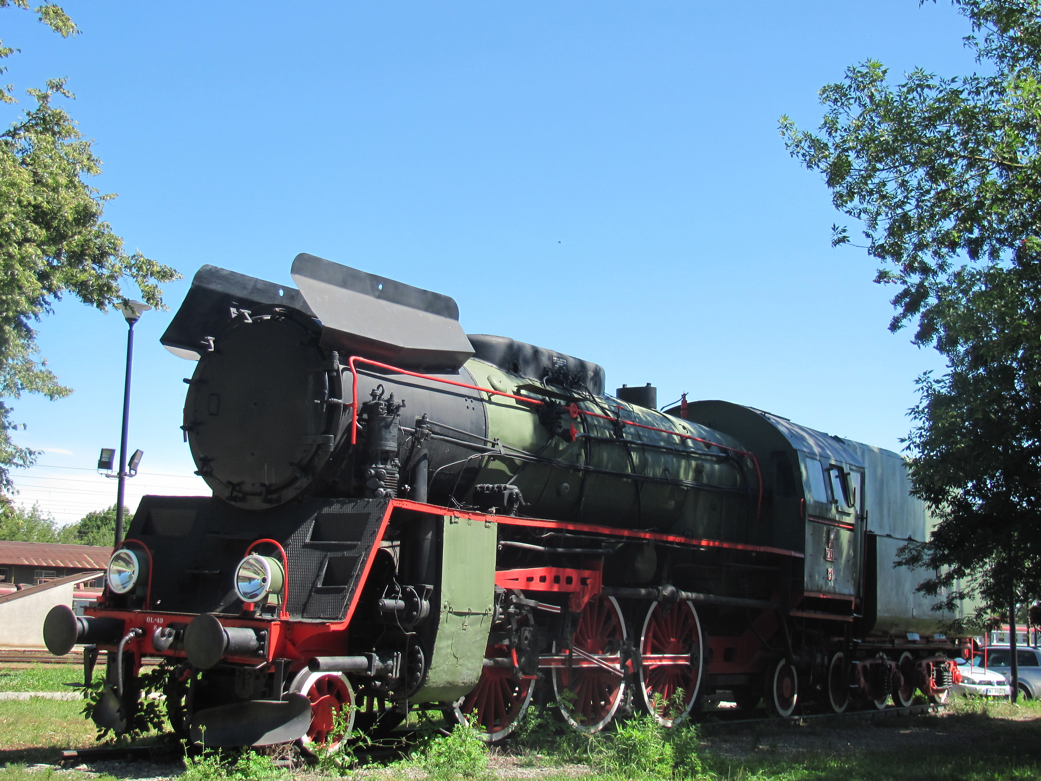 Zdjęcie wykonane na terenie stacji PKP.